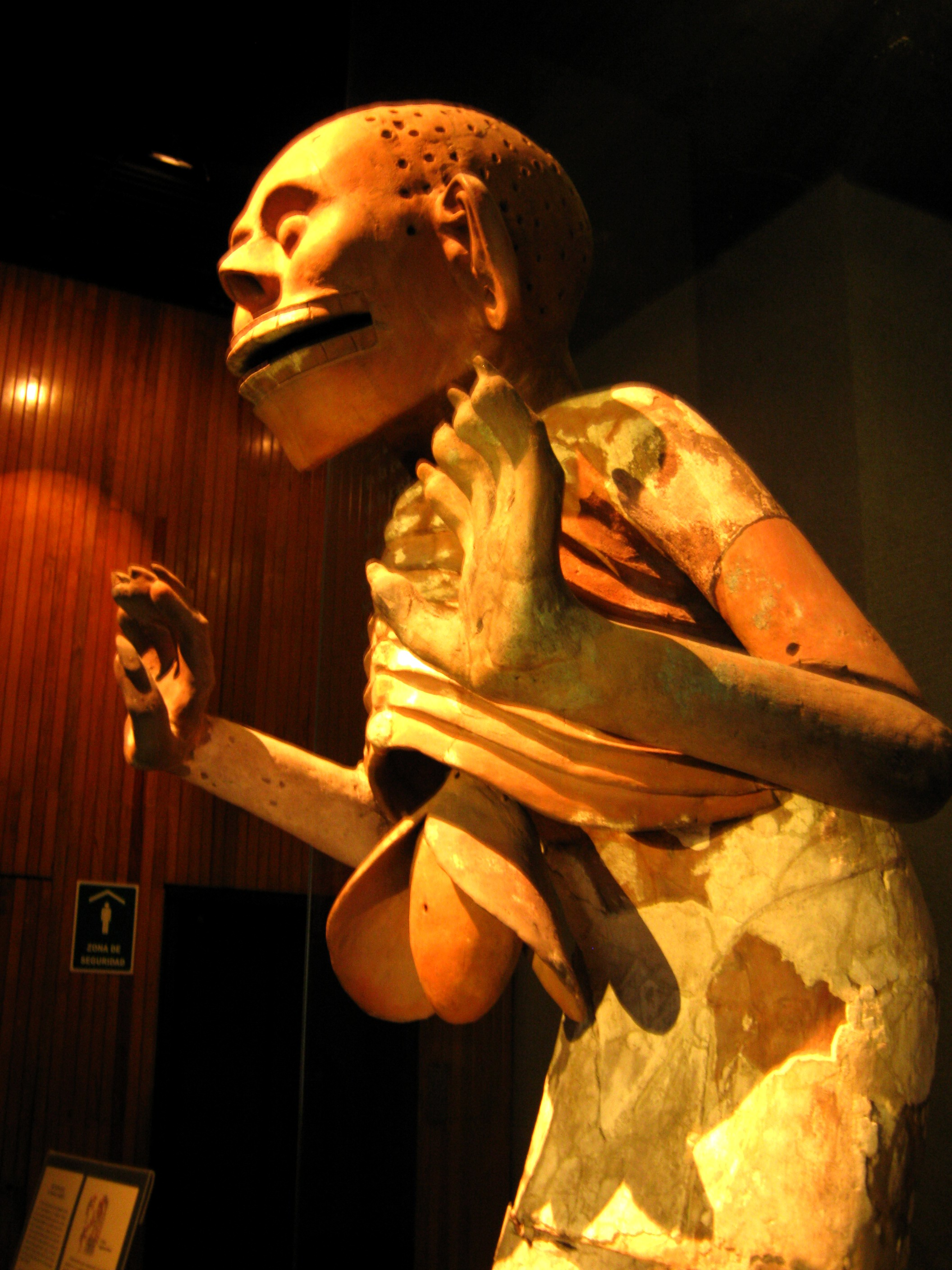 Mictlantecuhtli. Museo del Templo Mayor. Ciudad de México